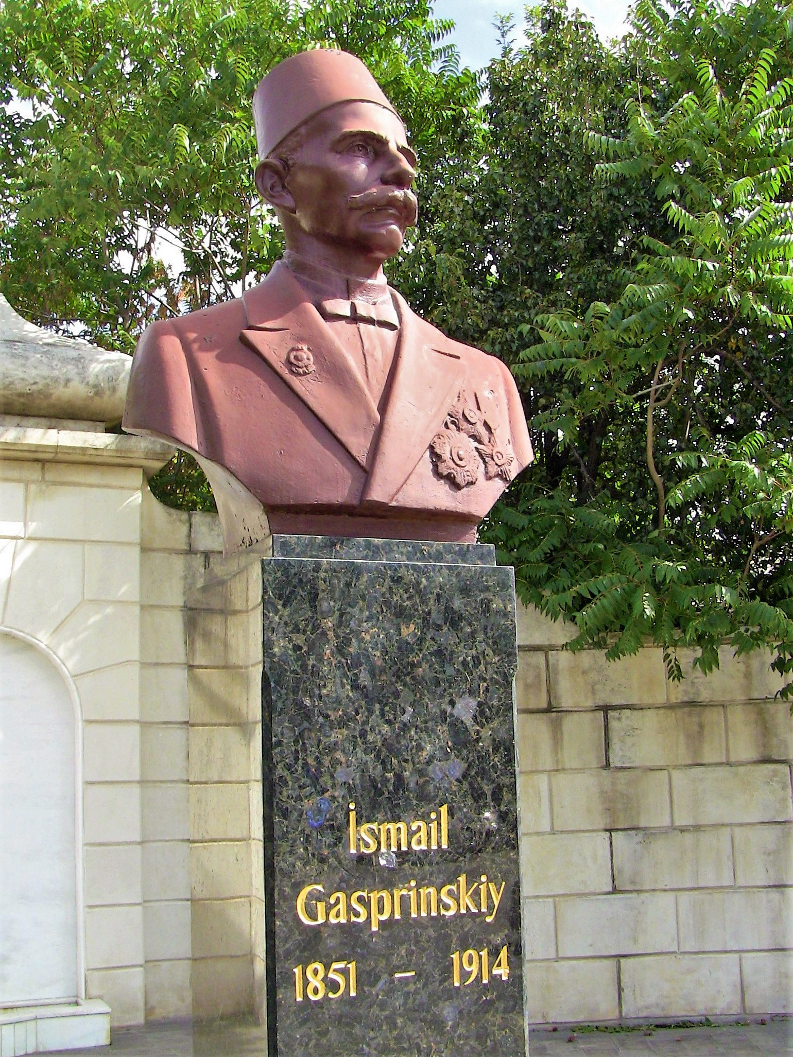 Гаспринский, Исмаил (бюст)